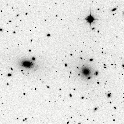 Kleiner Ausschnitt aus dem Coma Galaxienhaufen